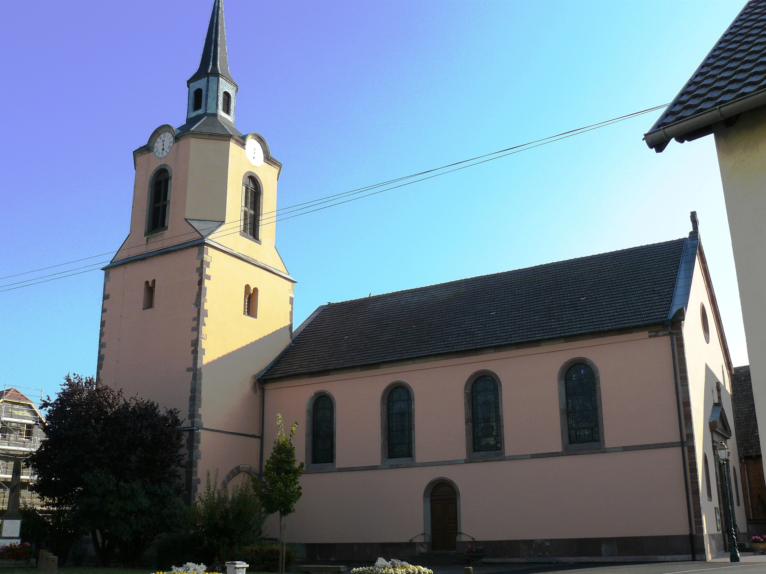 Église catholique Saint-Laurent